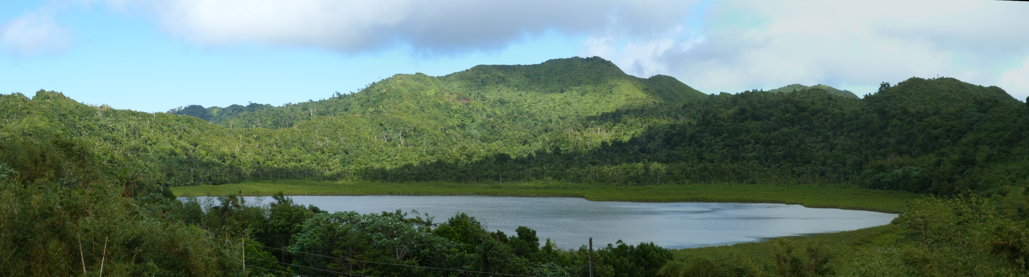 Der Grand Etang Kratersee im gleichnamigen Nationalpark